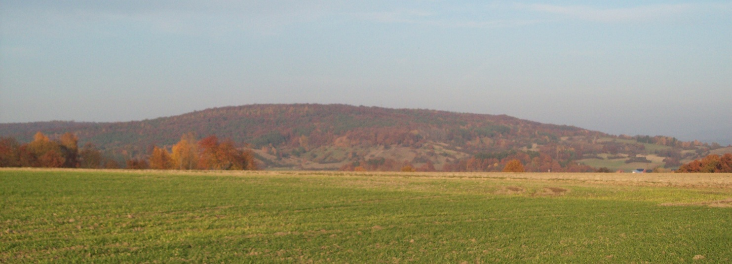 Kraiberg